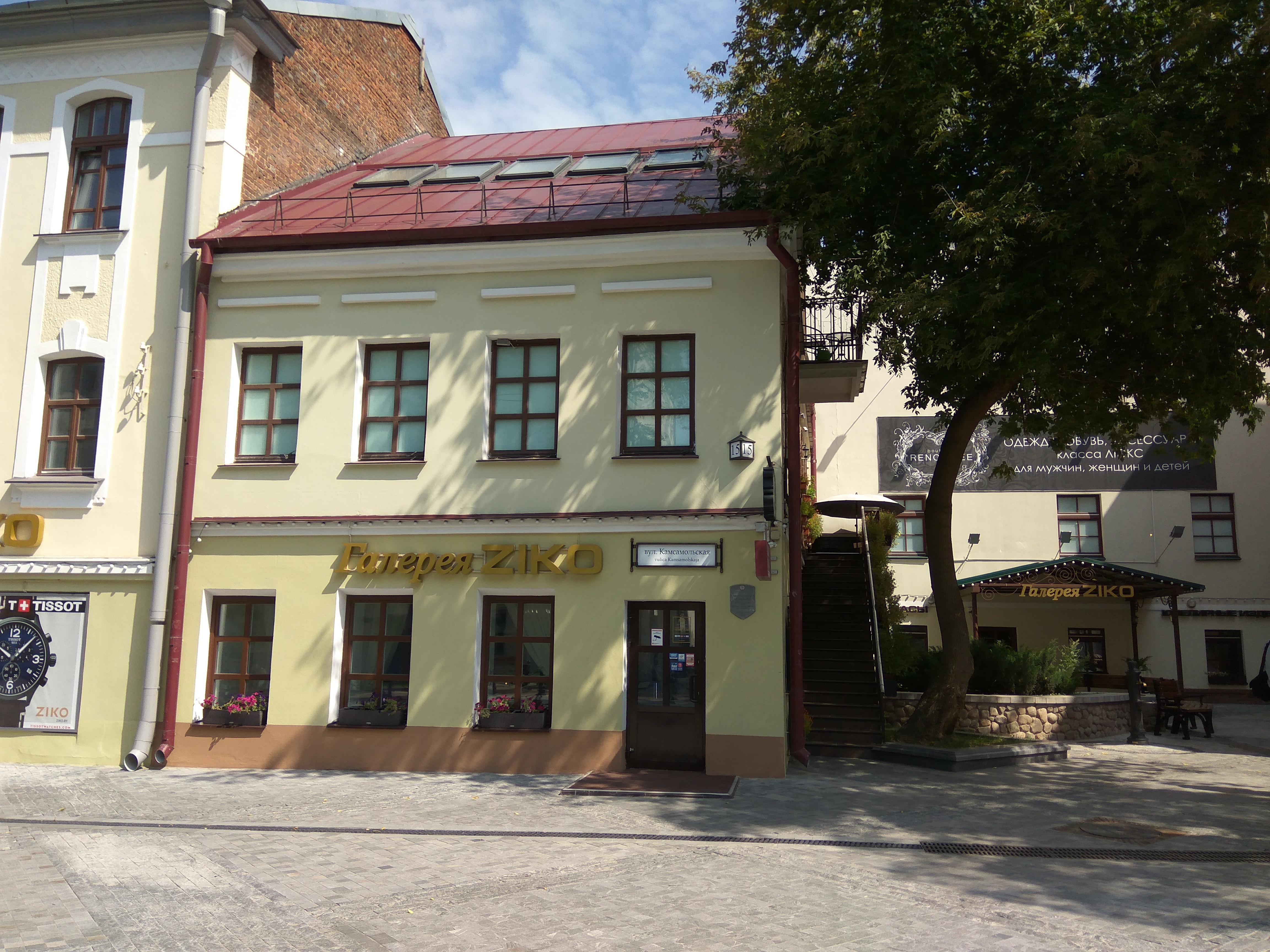 Мінск. Пешаходная Камсамольская (жнівень 2018)